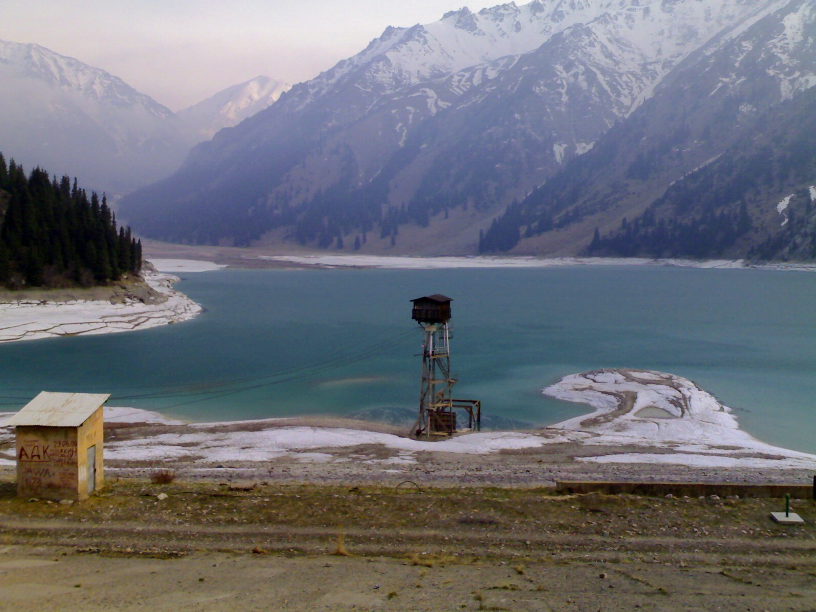 Большое Алматинское Озеро. Весной